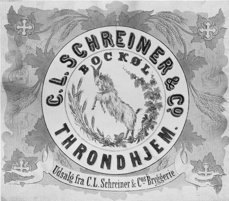 Etikett for bokkøl fra C.L. Schreiner & Co.s bryggeri i Trondhjem.